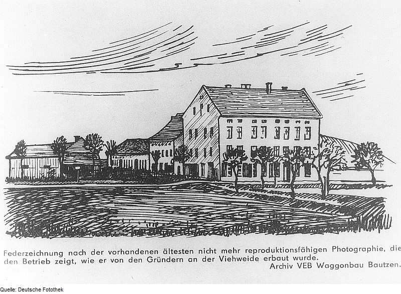 Original image description from the Deutsche Fotothek Bautzen. Waggonbau, Fabrik auf der Viehweide, aus: Bautzener Kulturschau, März 1967